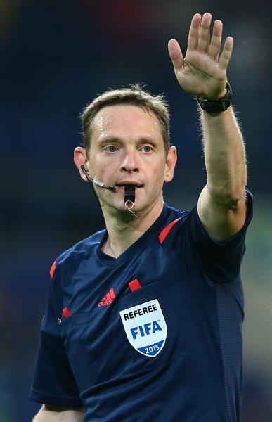 Євген Арановський - український футбольний арбітр